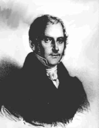 Louis Spohr 1784 - 1859 Komponist und Hofkapellmeister